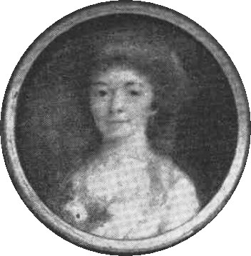 Miniatyrmålning visande Helena Quiding